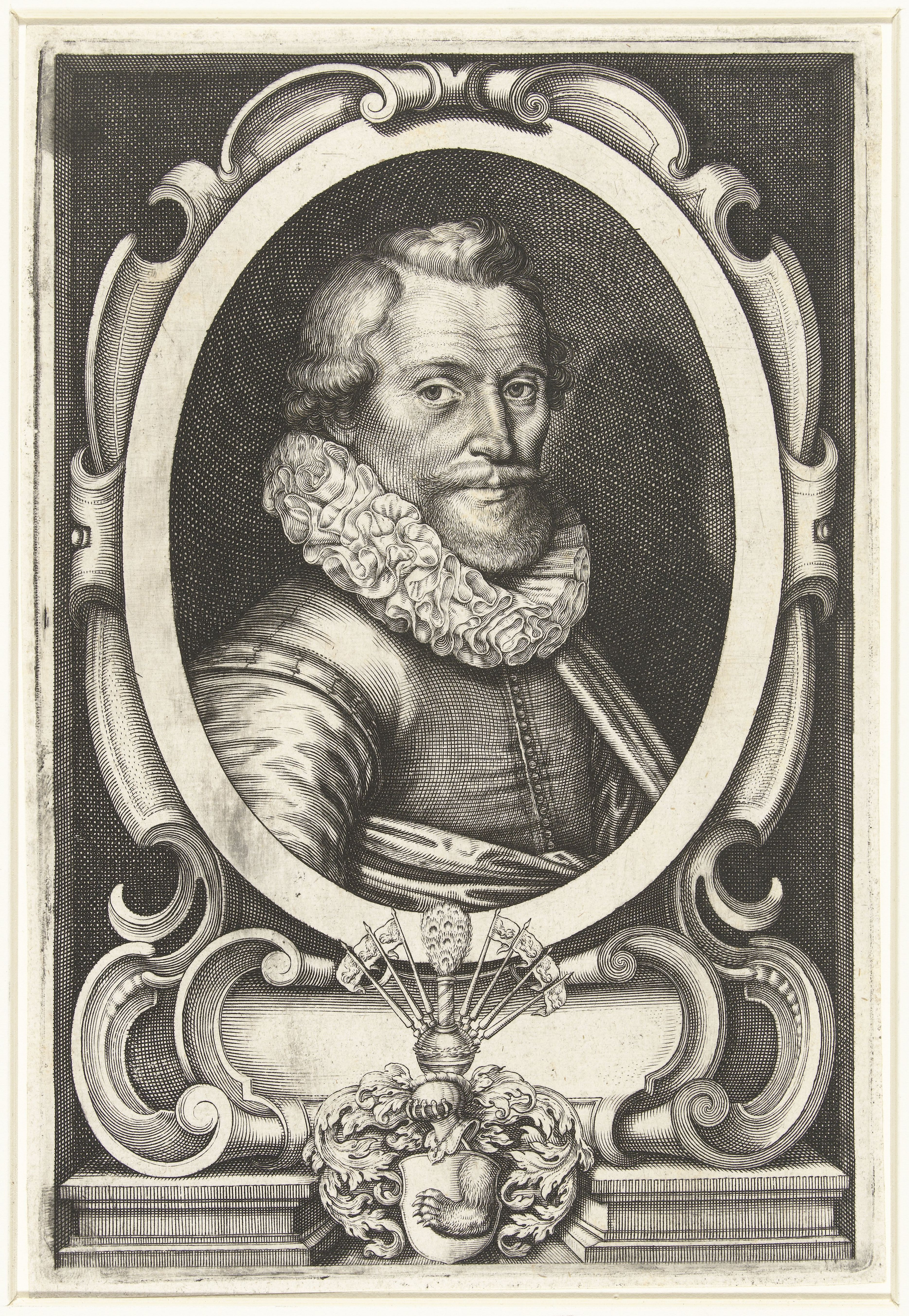 IdentificatieTitel(s): Portret van Philippus CluveriusObjecttype: prent Objectnummer: RP-P-BI-6932Opschriften / Merken: verzamelaarsmerk, verso, gestempeld: Lugt 2228Omschrijving: Portret van Philippus Cluverius, borststuk met plooikraag in ovale cartouche, onder portret wapenschild met berenpoot en vaas met pauwenveren.VervaardigingVervaardiger: prentmaker: Willem Jacobsz. Delff (toegeschreven aan)Plaats vervaardiging: DelftDatering: 1590 - 1538Fysieke kenmerken: proefdruk van gravureMateriaal: papier Techniek: graveren (drukprocedé)Afmetingen: plaatrand: h 206 mm × b 139 mmOnderwerpWat: neck-gear: collar (+ men's clothes)Wie: Philipp CluverVerwerving en rechtenVerwerving: onbekendCopyright: Publiek domein